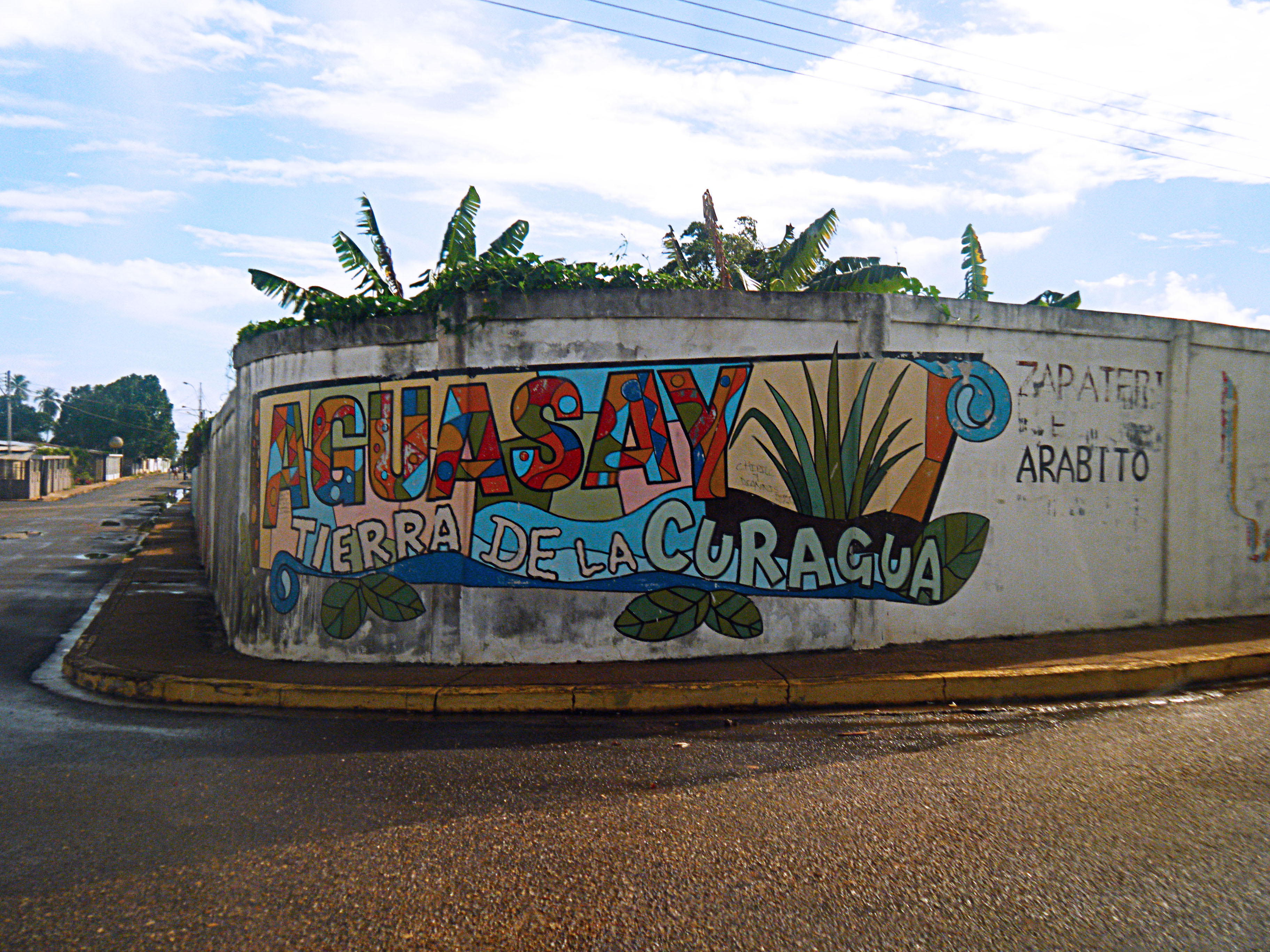 Mural por las calles de la ciudad Aguasay, Estado Monagas.